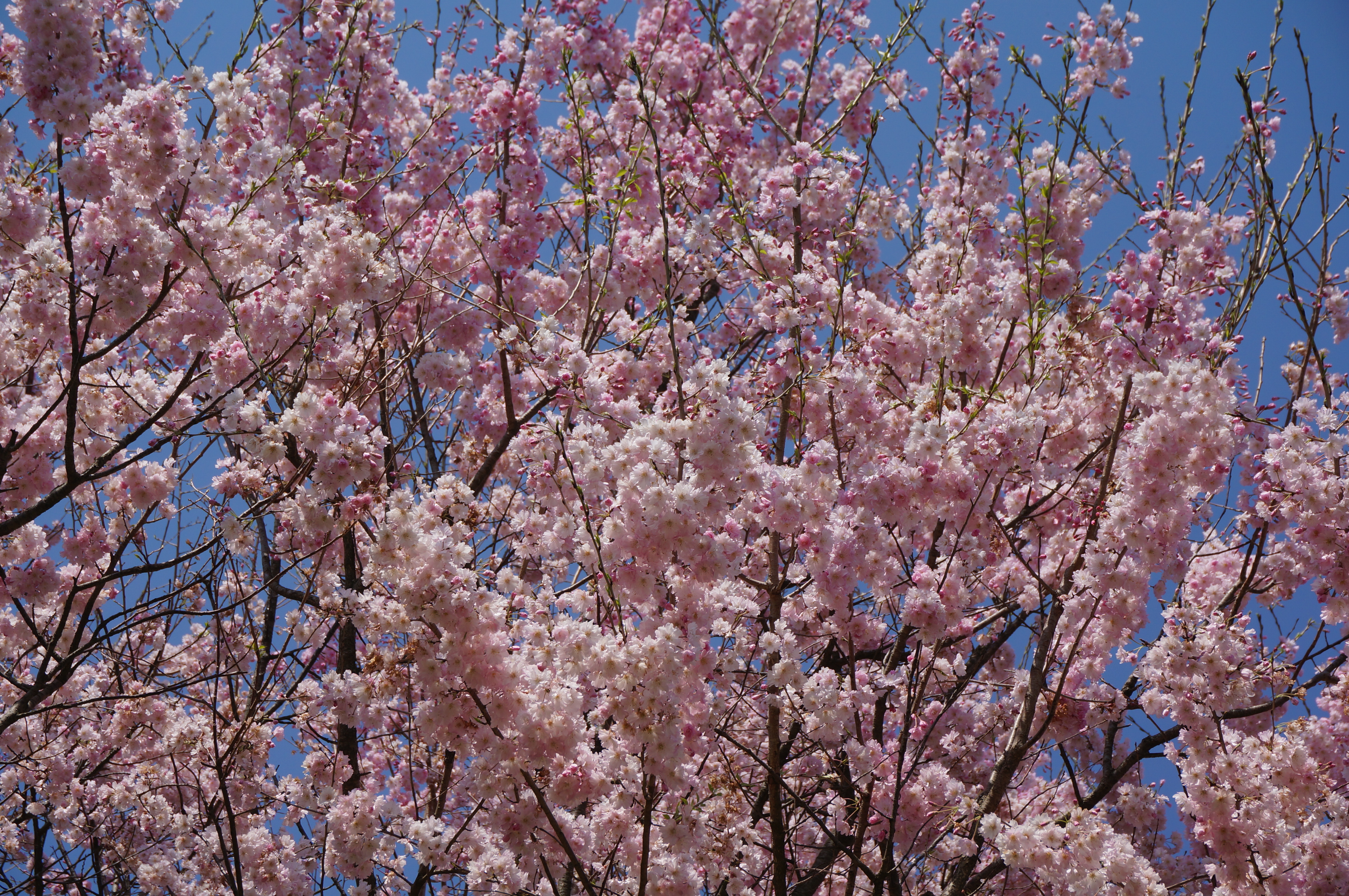 日本花の会 結城農場のマイヒメの原木